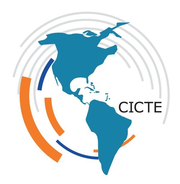 logo cicte